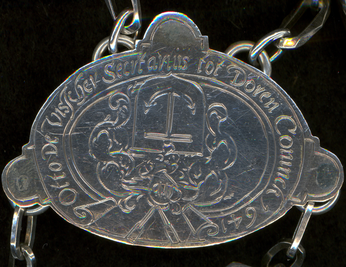 Scan van Koningsschild van Otto de Visscher secretarius tot Doren Coninck 1641 - Koningsschild van St. Jorisgilde te Deurne N.Br. (zelf gemaakte scan - vrij van copyright, Peter bankers)